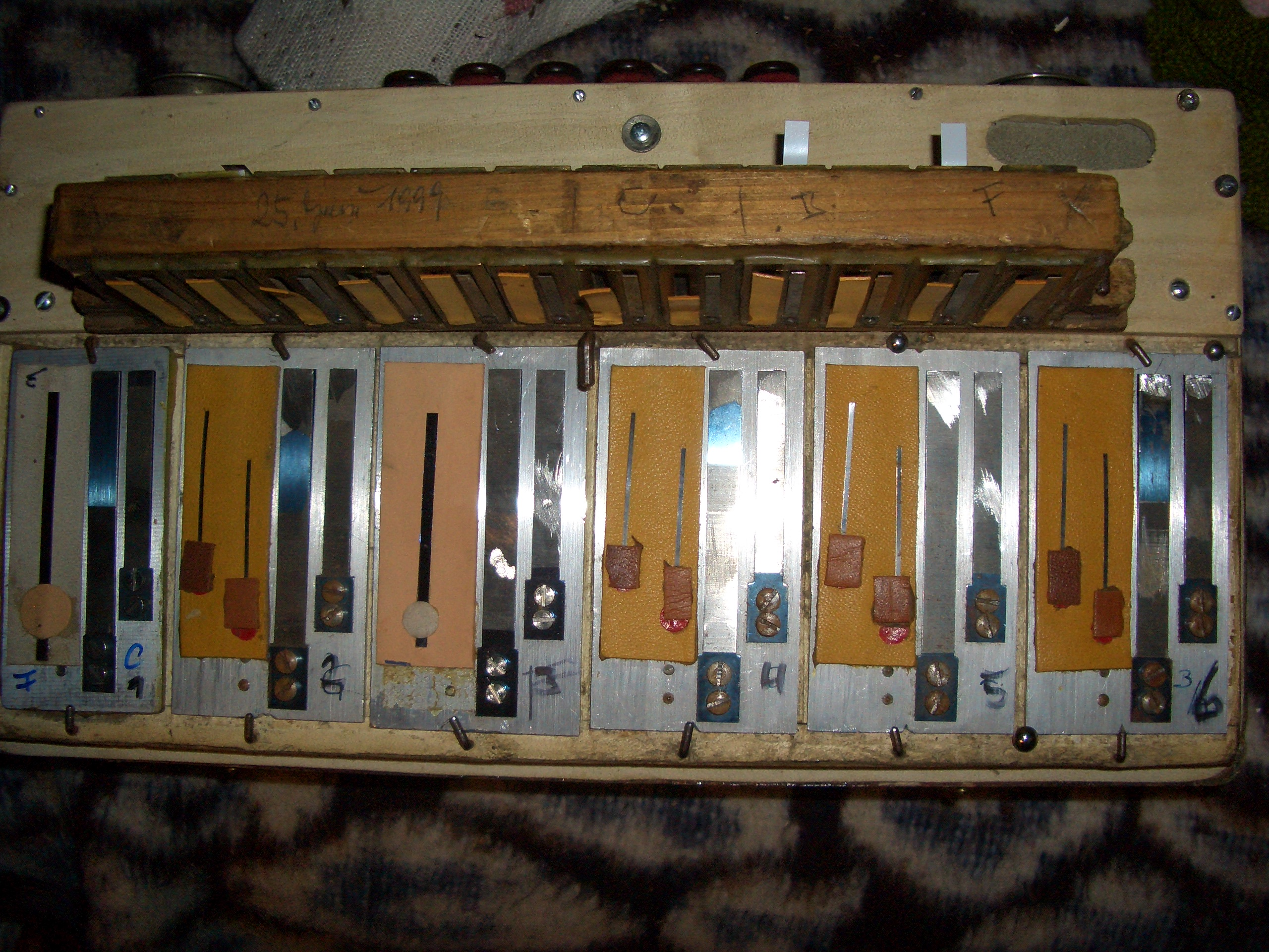 Josef Hlaváček Harmonika baujahr nicht bekannt. Bassteil von innen